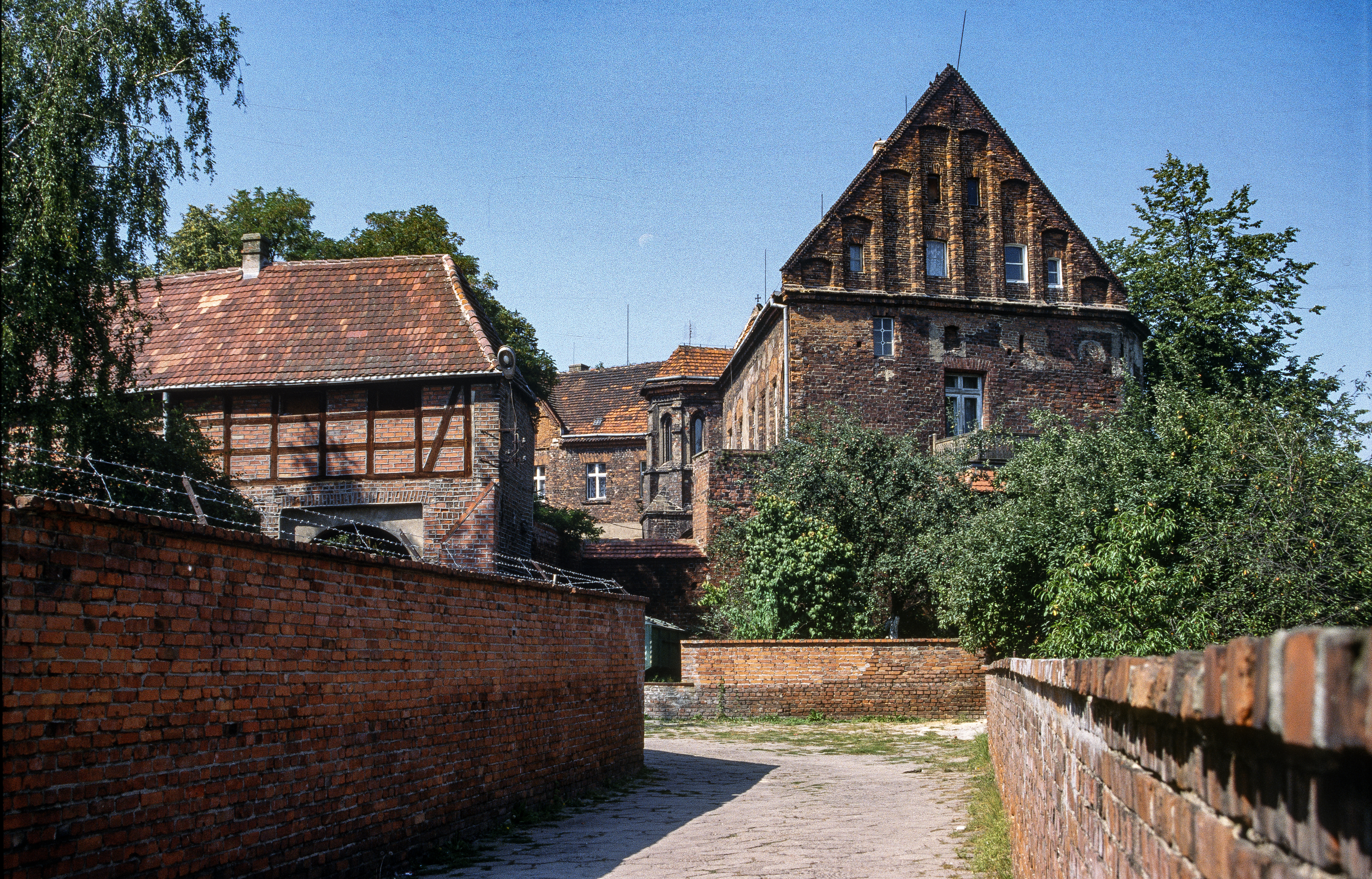 Namysłów